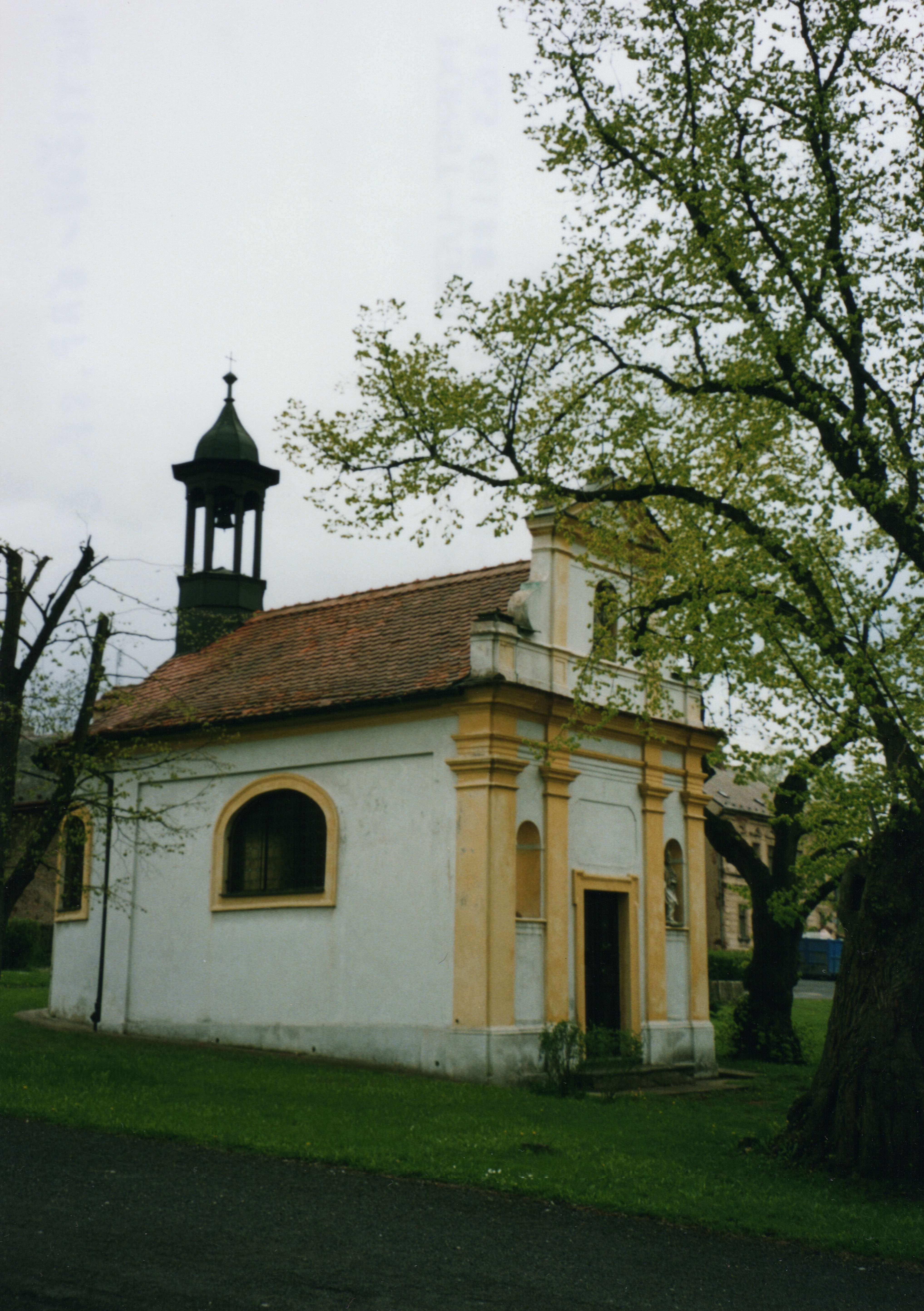 Kaple sv. Eustacha v Mstišově z počátku 18. století, Dubí, okres Teplice, Ústecký kraj, Česká republika.